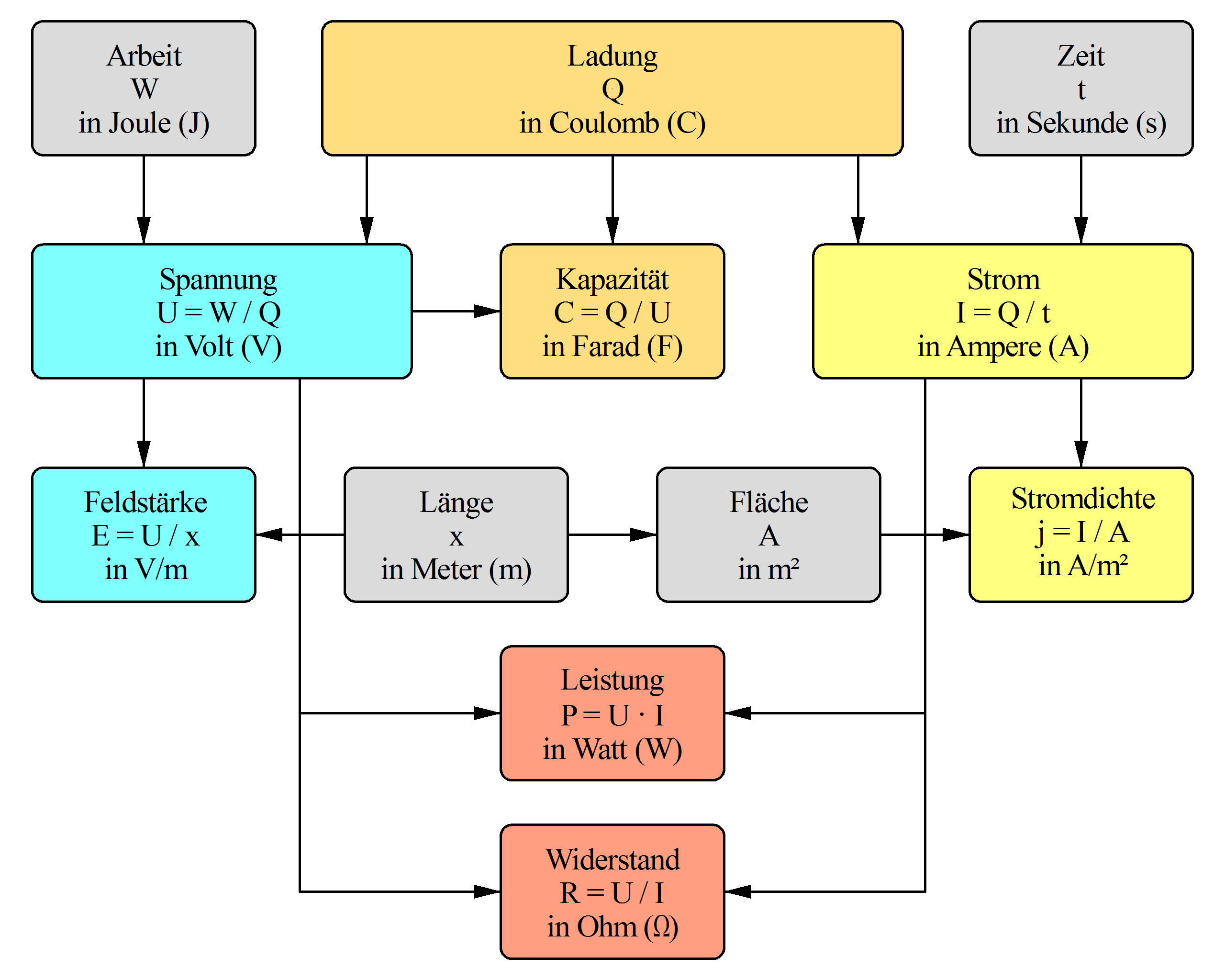 Zusammenhang wichtiger elektrischer Größen